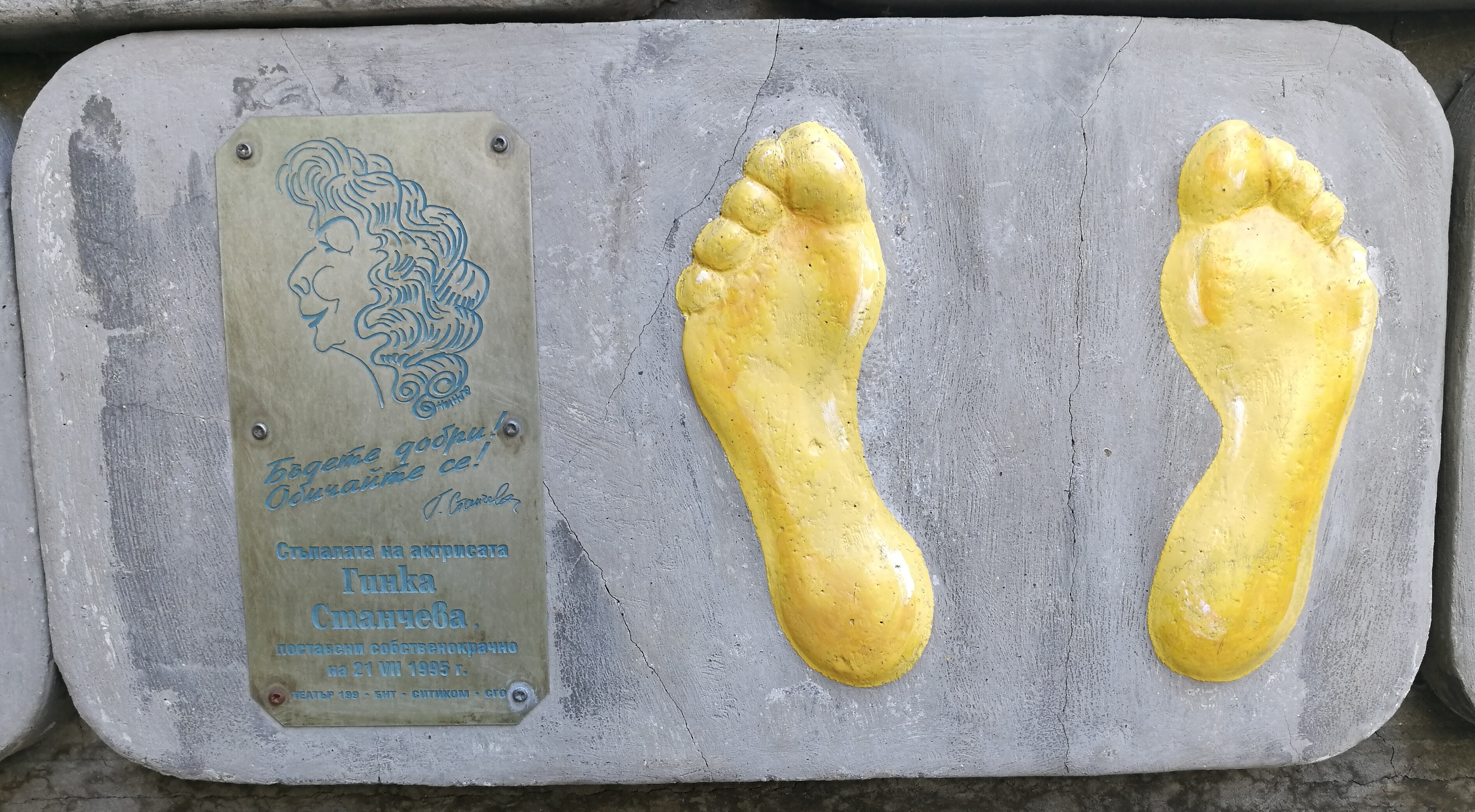 Стената на славата пред Театър 199 - пано с отпечатъци, послание и шарж на Гинка Станчева.